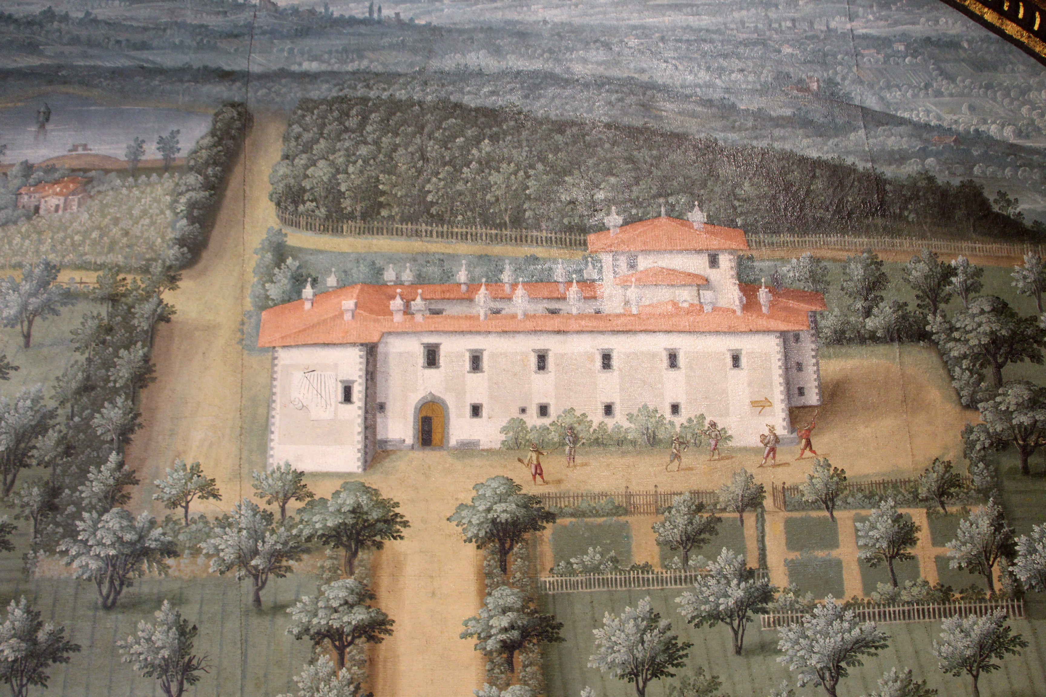 Villa medicea della Petraia - MIBAC The making of this document was supported by Wikimedia CH. (Submit your project!) For all the files concerned, please see the category Supported by Wikimedia CH. This is a photo of a monument which is part of cultural heritage of Italy.